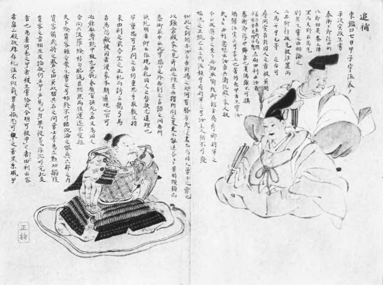 『合璧邪正訣』第10図 追補（東鑑曰七日甲子宇佐美ノ平次実政云々） 烏帽子垂衣の人物と鎧武者の人物の対談せる図